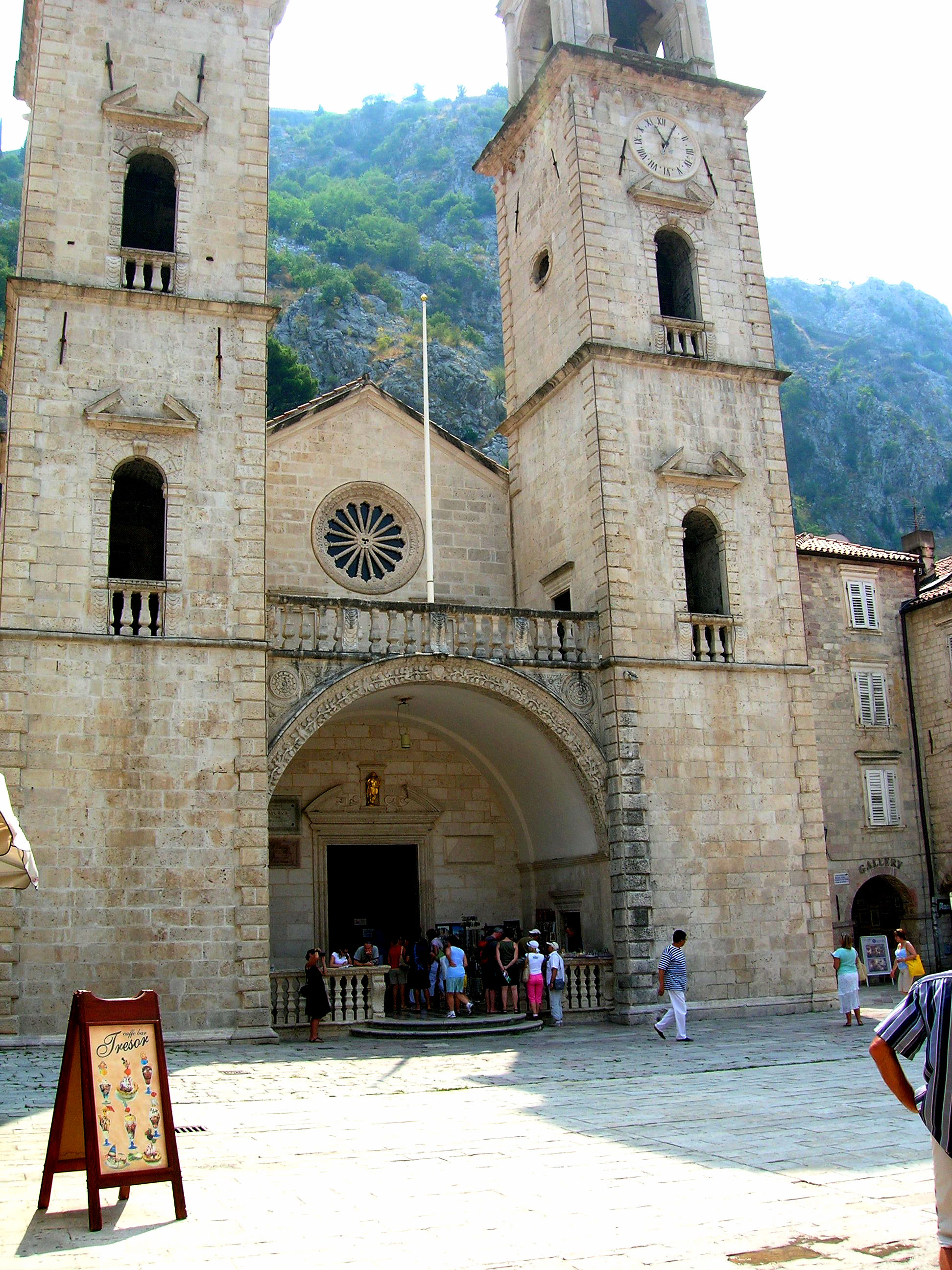 Kathedral vu Kotor .